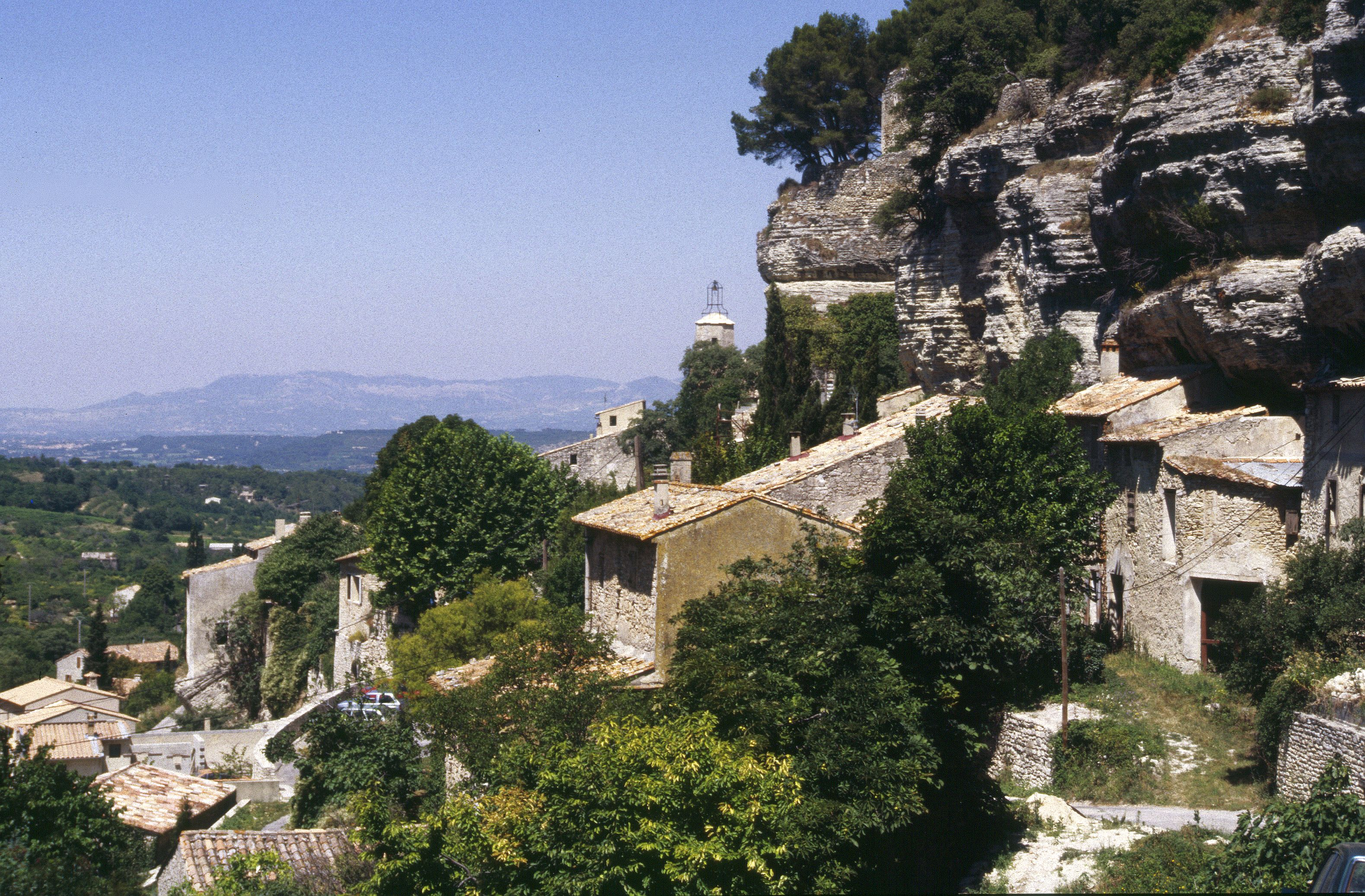 Le Beaucet